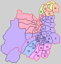 長野県東筑摩郡の町村。